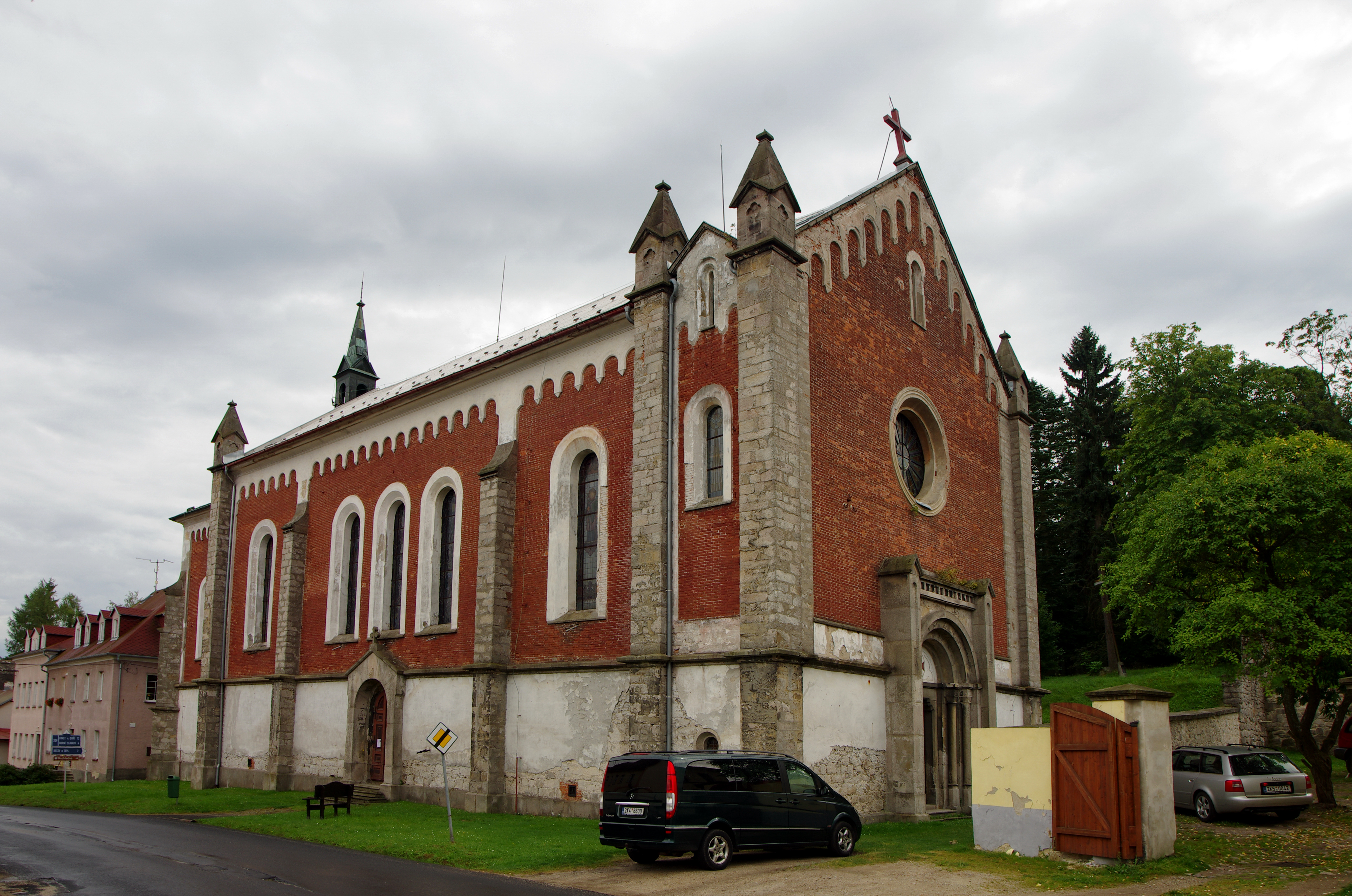 Krásno, kostel sv. Kateřiny, okres Sokolov